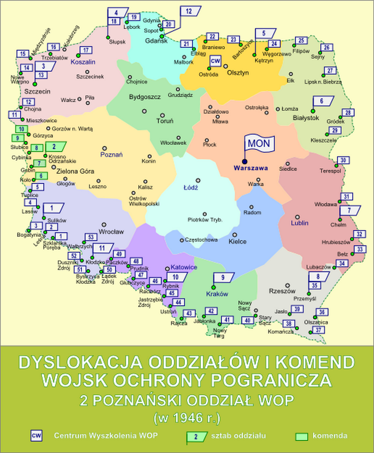 Dyslokacja oddziałów i komend Wojsk Ochrony Pogranicza w październiku 1946 r. - 2 Poznański Oddział WOP